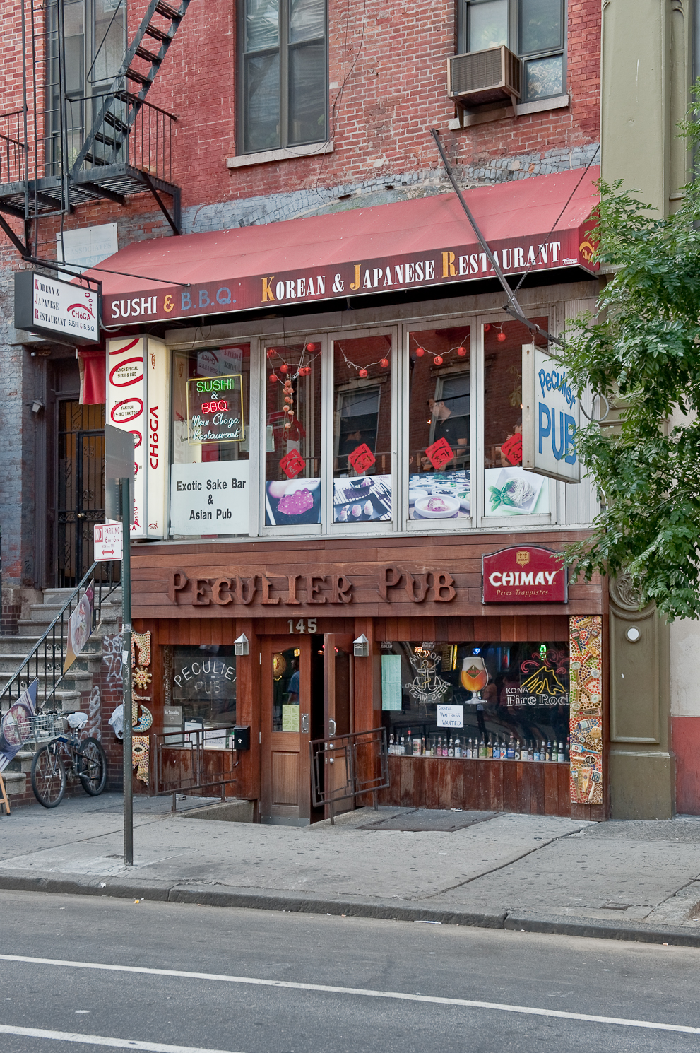 Peculier Pub